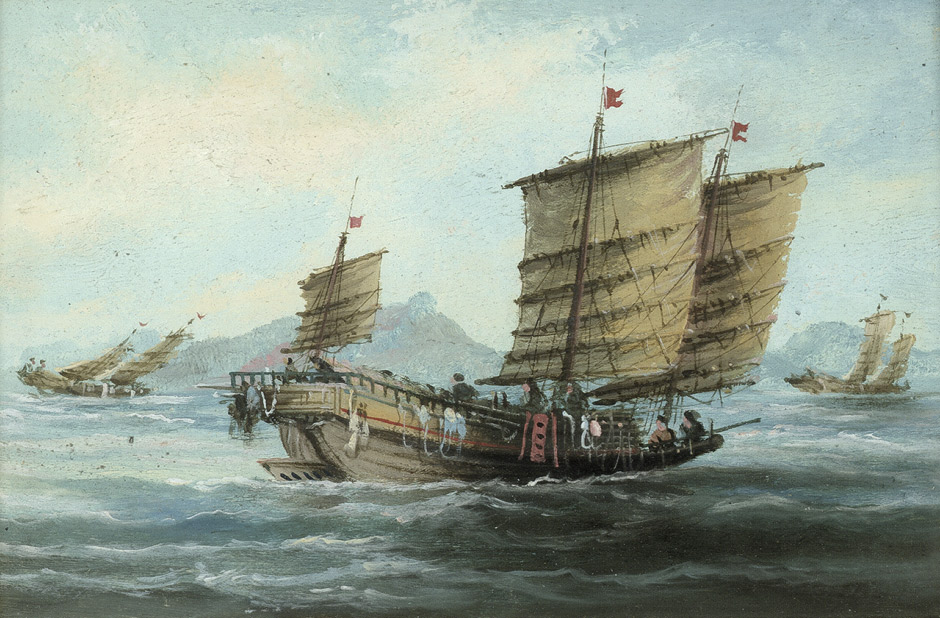 Dschunken bei bewegter See vor der chinesischen Küste.